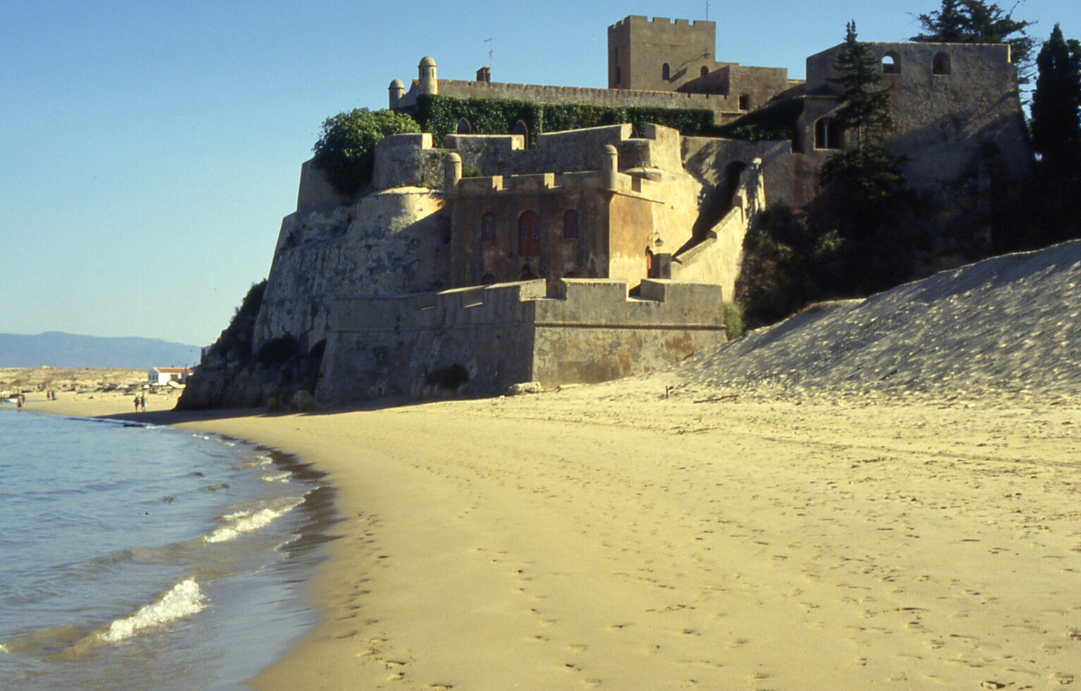 Ferragudo Strand 2